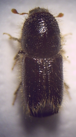 Ips_amitinus__20fach_von_oben